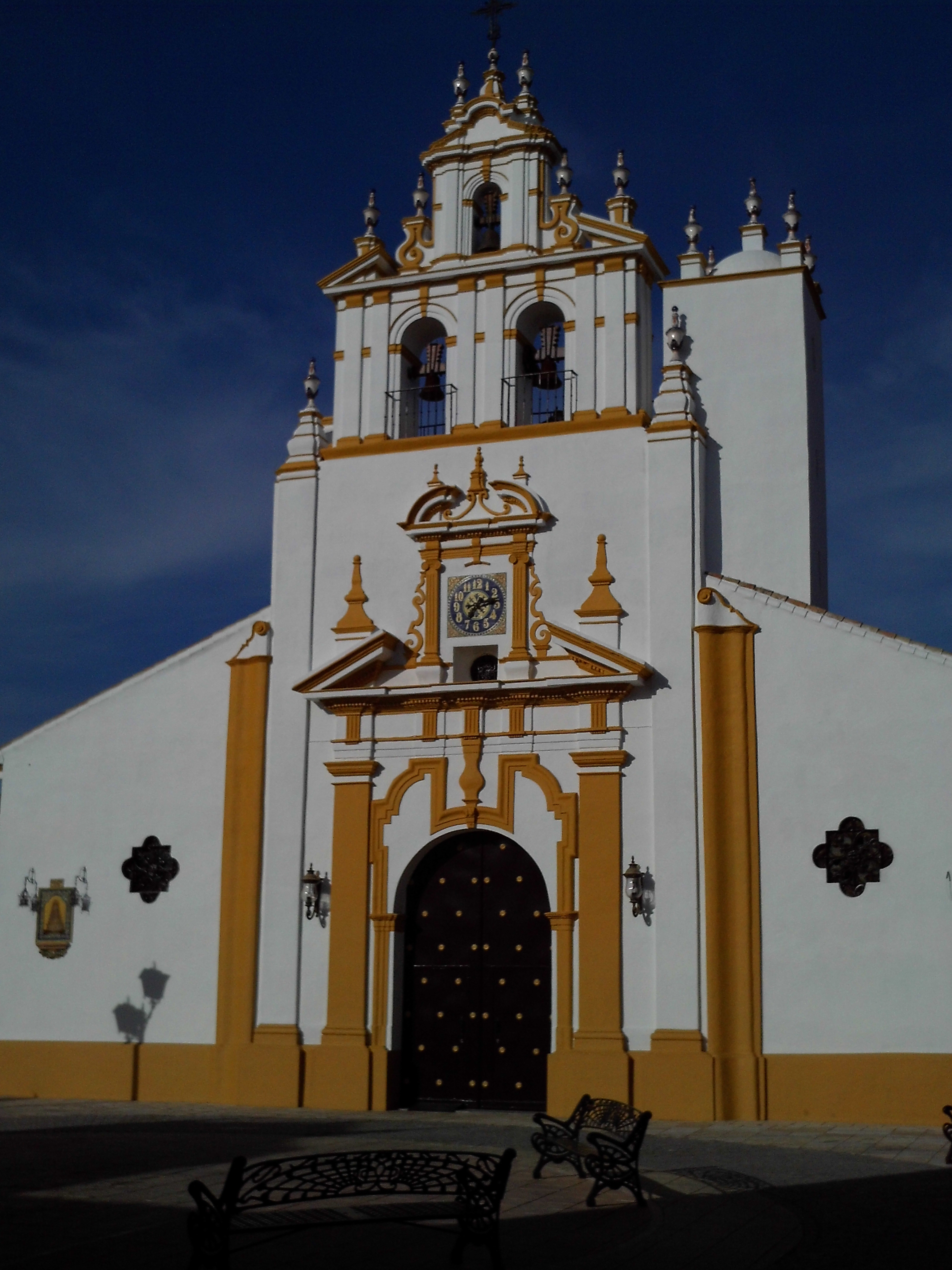 Iglesia de la Encarnación de Bormujos, cuya fachada principal da la plaza de la Iglesia